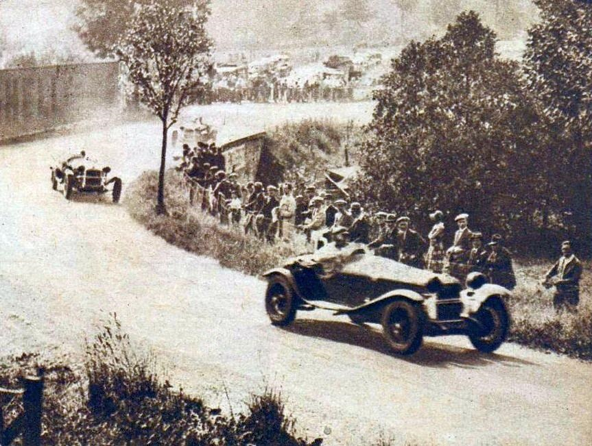 24 Heures de Spa 1930, Ivanowski (left) behind Chiron.